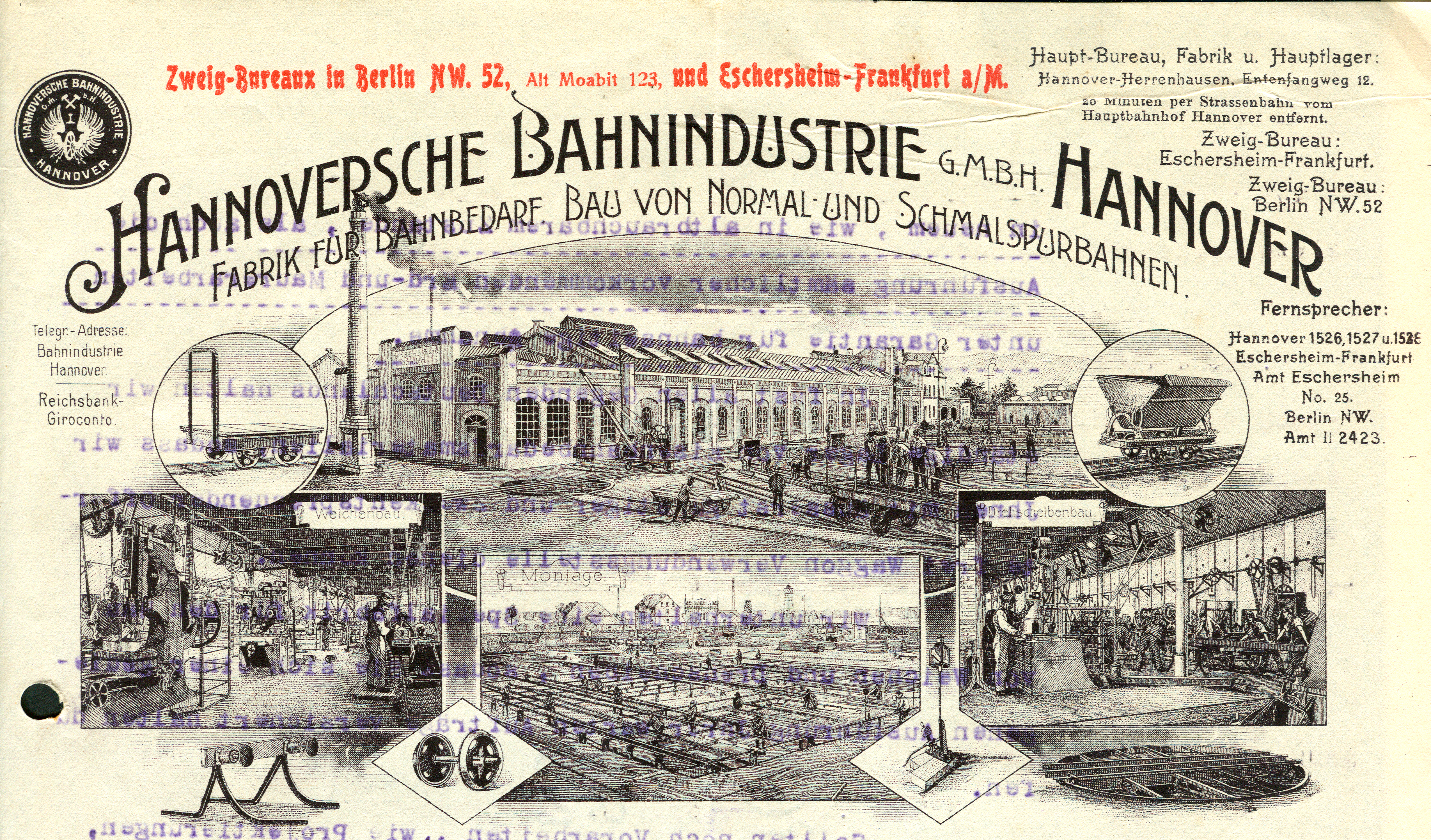 Briefkopf der Hannovschen Bahnindustrie mit Darstellungen einzelner Produkte der Firma sowie Aussen- und Innenansichten des Produktionsstandortes ...